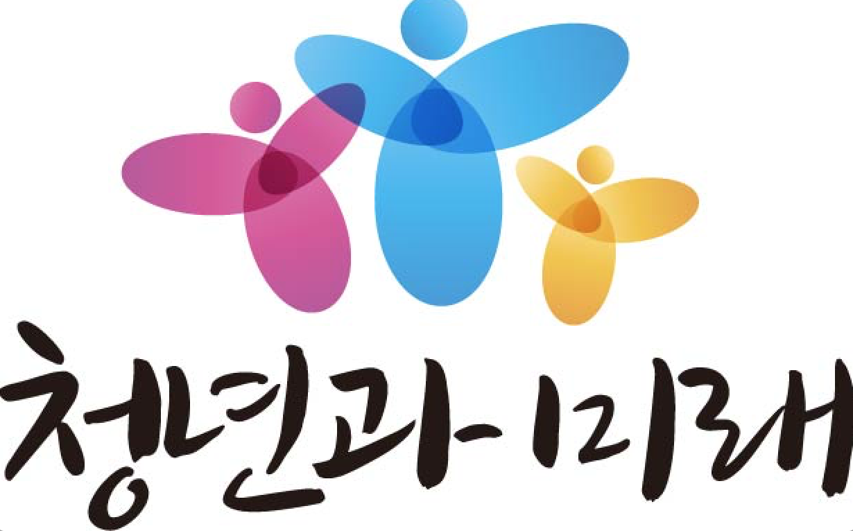 사단법인 청년과미래는 국회사무처 소관 청년단체이다.